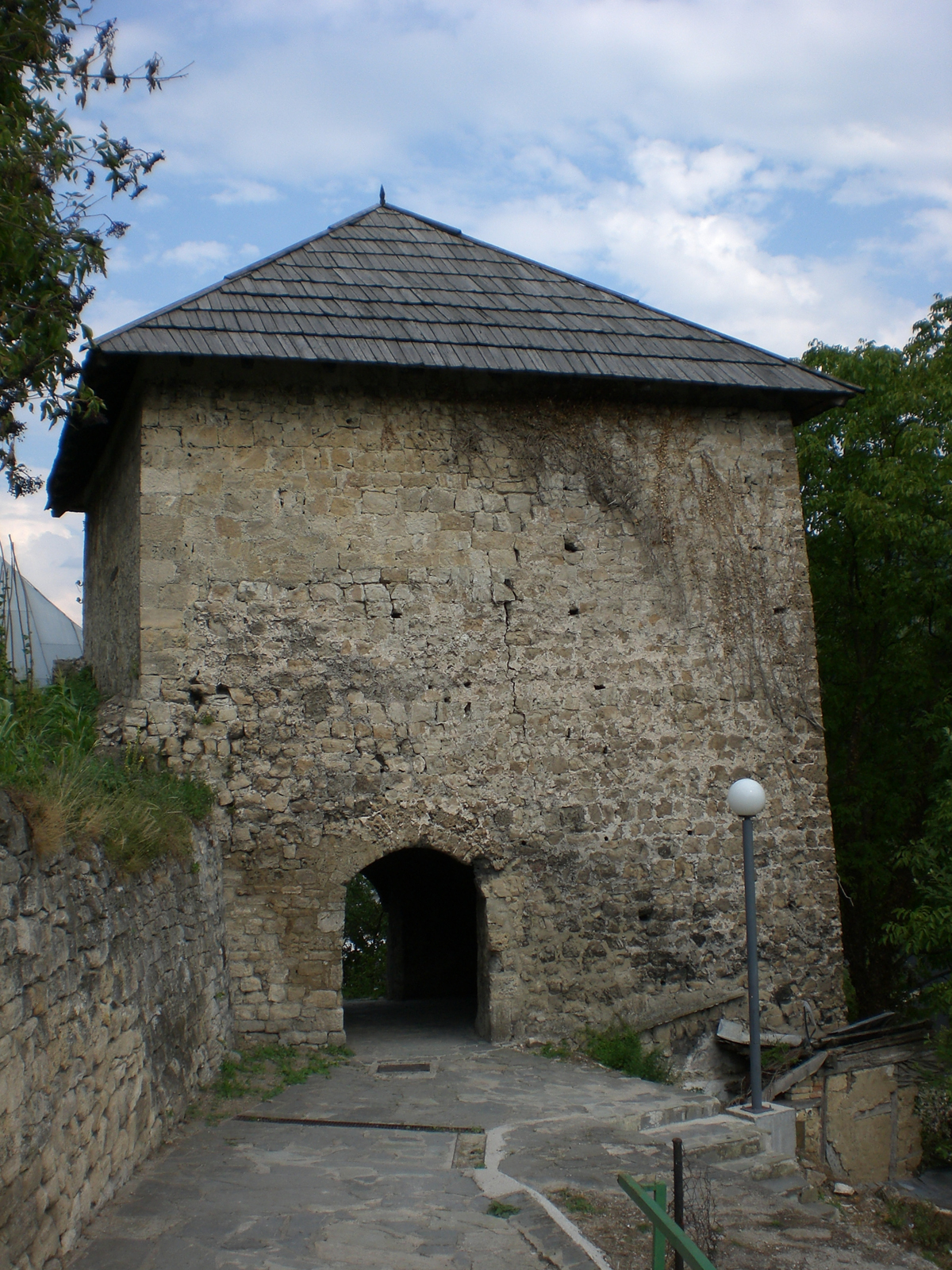 Sahat-kula Jajce